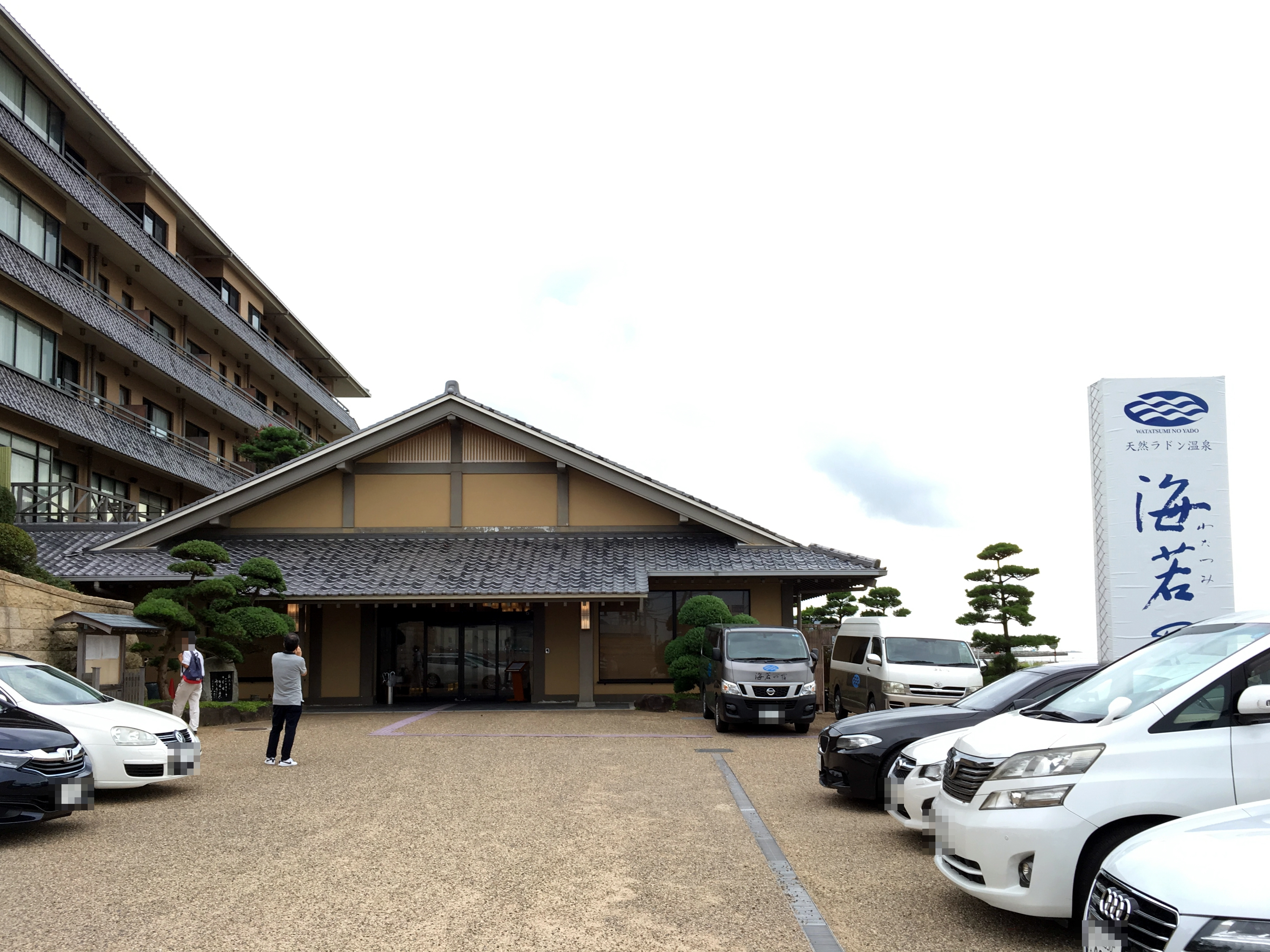 海若の宿 正面入り口